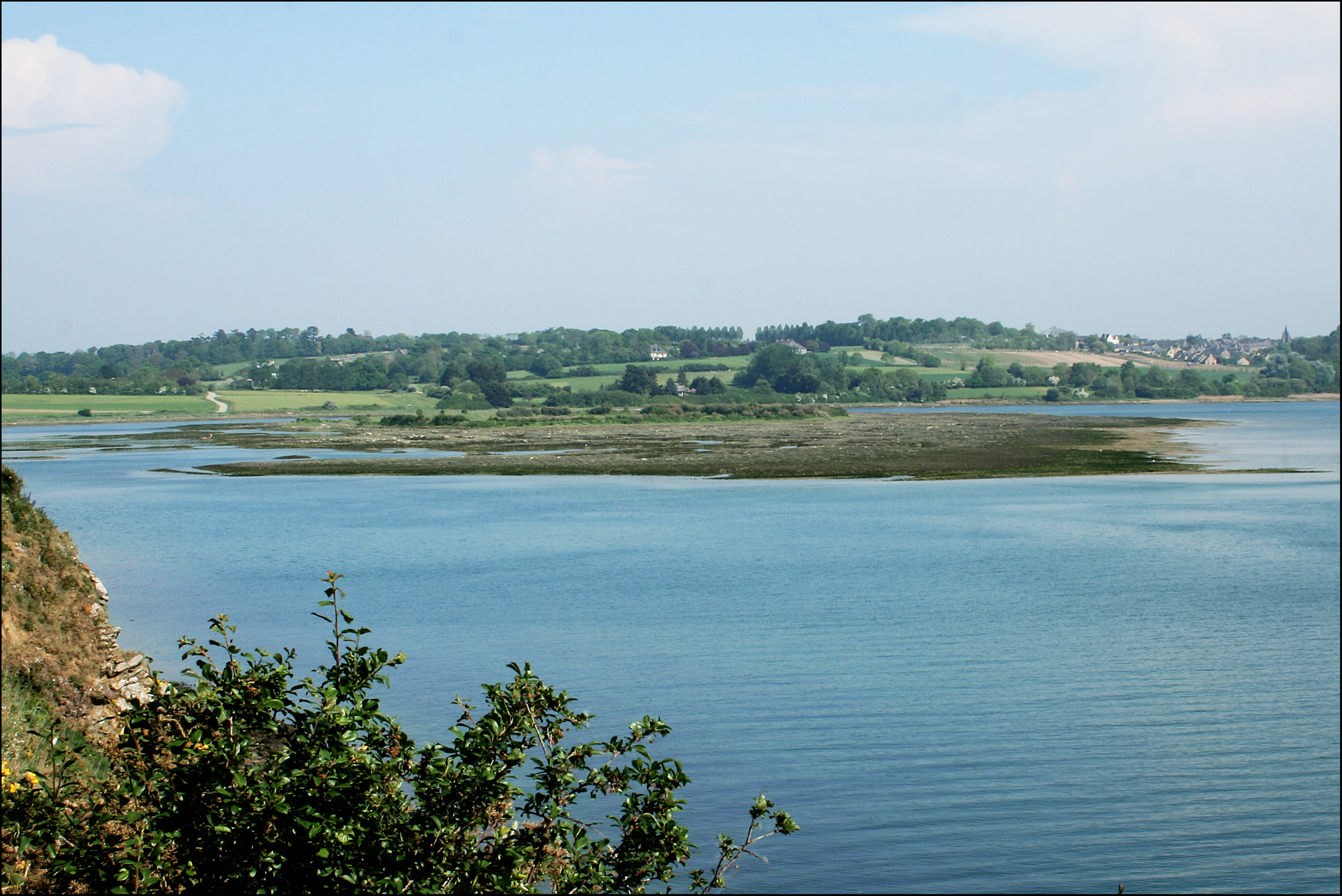 Vestiges d'une enceinte médiévale appelée l'Huîtrière dans l'anse de Vigneux à Saint-Suliac .